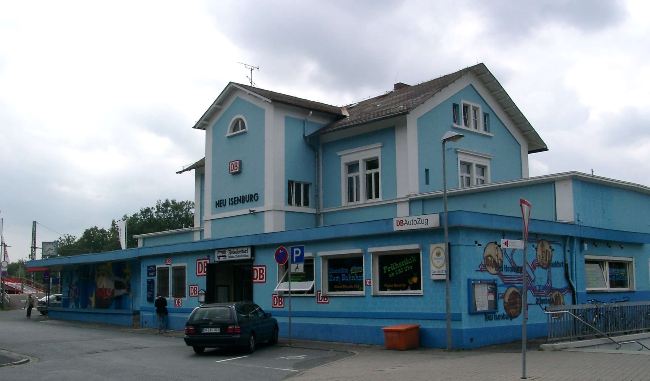 Neu-Isenburg, Bahnhof